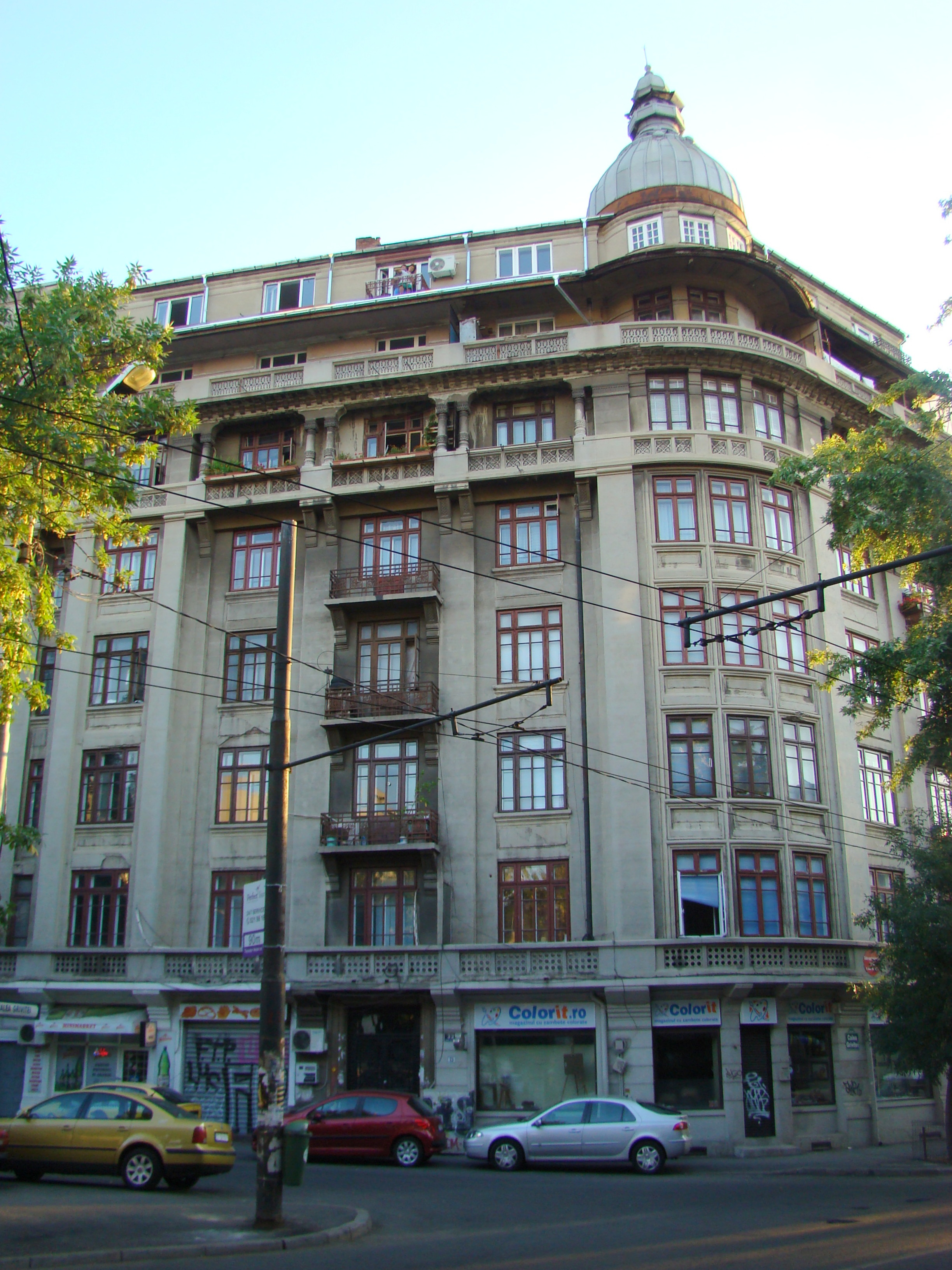 Casă monument istoric, Calea Griviței, nr.33